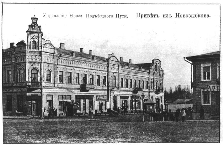 Новозыбков. Управление Новозыбковского подъездного пути